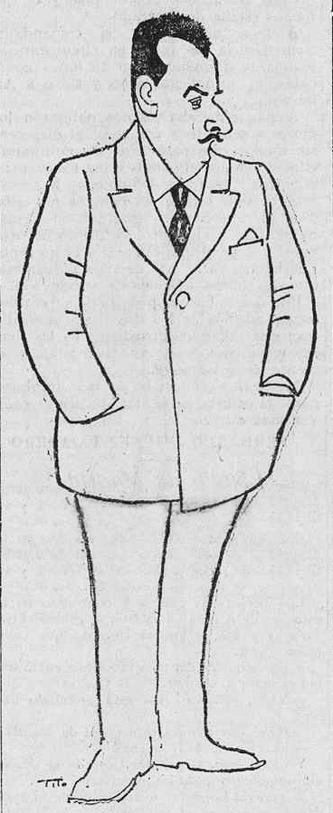 Eduardo Marquina.